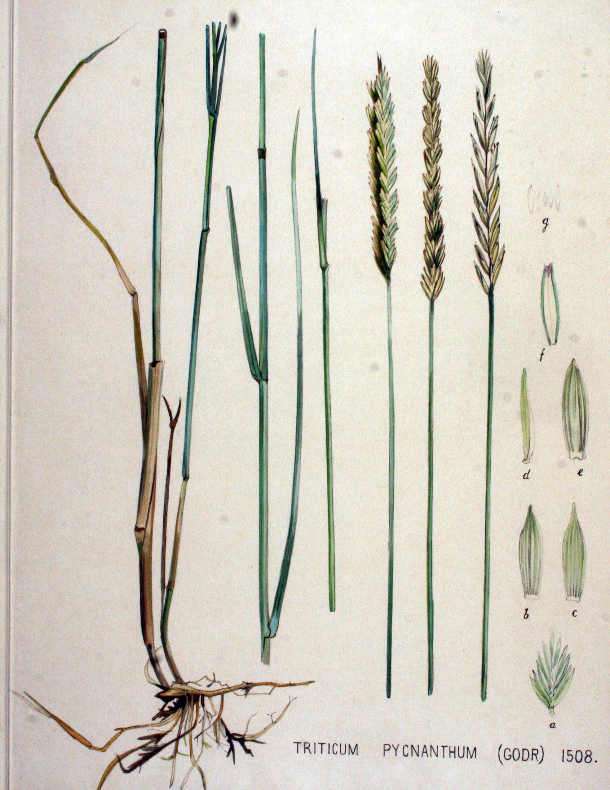 Elymus athericus (Link) Kerguélen (Syn. Elymus pycnanthus (Godr.) Melderis)